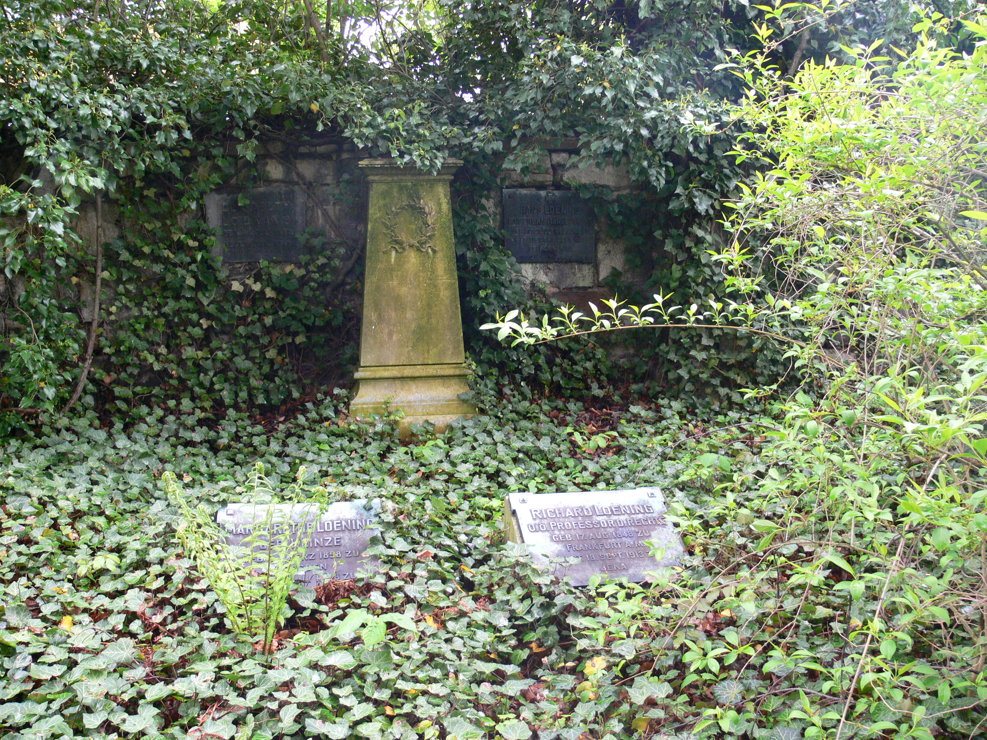 Jena, Johannisfriedhof Grabmal Loening, darunter: Richard Loening (1848-1913), Prof. der Rechte Margarethe Loening